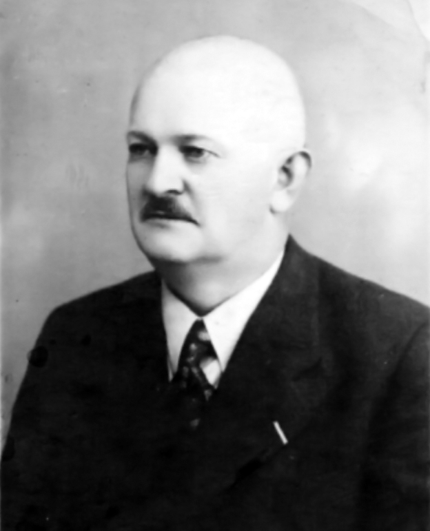 Piotr Łyszczak